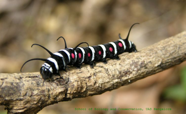 Idea malabarica caterpillar, India